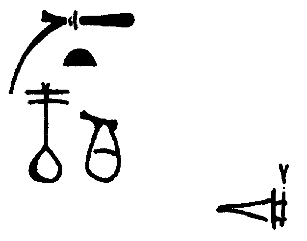 further ink inscription of the high official Maapermin